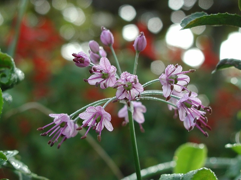 ラッキョウ 撮影場所：広見町 撮影日：２００１年１０月２７日 Template:草花写真館